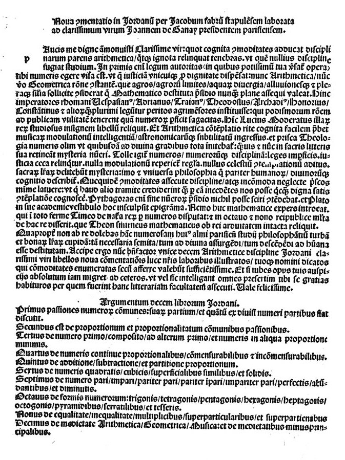 In hoc opere contenta. Arithmetica decem libris demonstrata ; Musica libris demonstrata quattuor ; Epitome i[n] libros arithmeticos diui Seuerini Boetij ; Rithmimachie ludus qui et pugna nu[me]ror[um] appellat[ur]. - [S.l.] : [s.n.], [s.d.] (… Parhisij ... : … curarunt vna formulis emendatissime mandari ... Joannes Higmanus et Volgangus Hopilius ..., 1496). - 72 c. ; 2°. - ISTC ij00472000; IGI 3781; GW M15065. - Indicazione di responsabilità principale a carta a2r. - A cura di Jacques Lefevre d'Etaples, il cui nome compare a c. a2r. - Alla fine del colophon l'indicazione: ""… Dauid Lauxius Brytannus Edinburgensis: vbique ex archetypo diligens operis recognitor"". - La Rithmimachia è talvolta attribuita a John Shirwood, vescovo di Durham " .